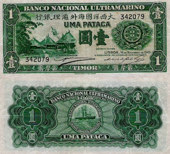 1 Pataca banknote of Portuguese Timor